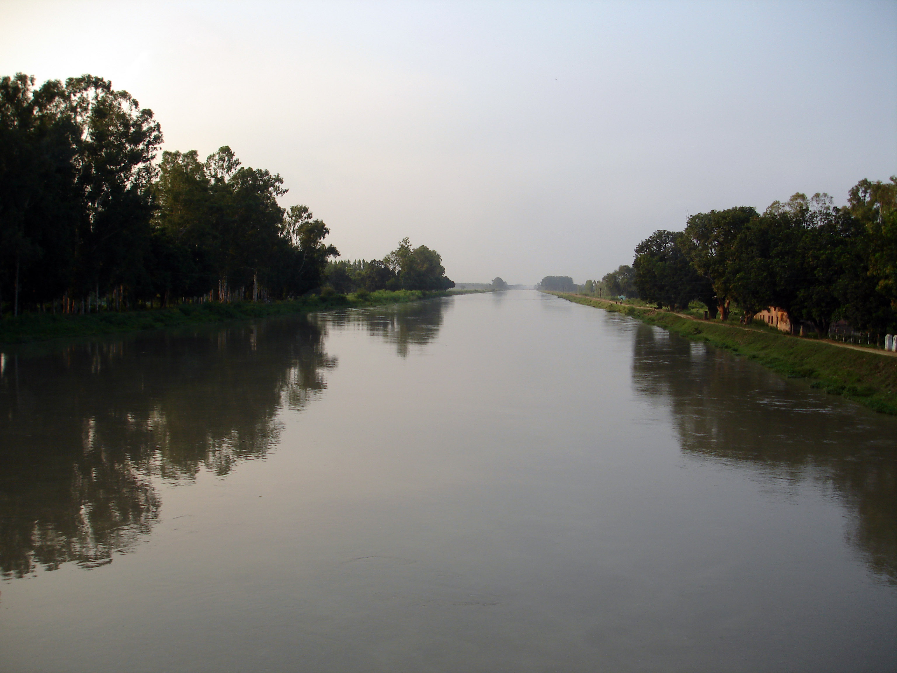 Canal